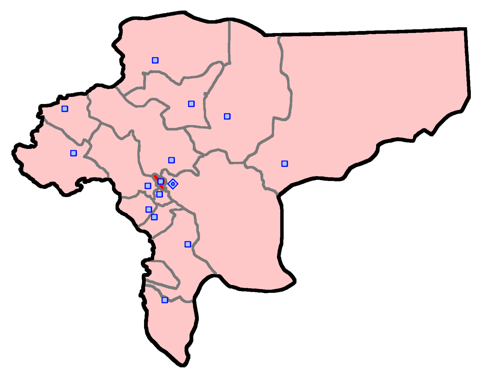 حوزهٔ انتخاباتی خمینی‌شهر برای انتخابات مجلس شورای اسلامی